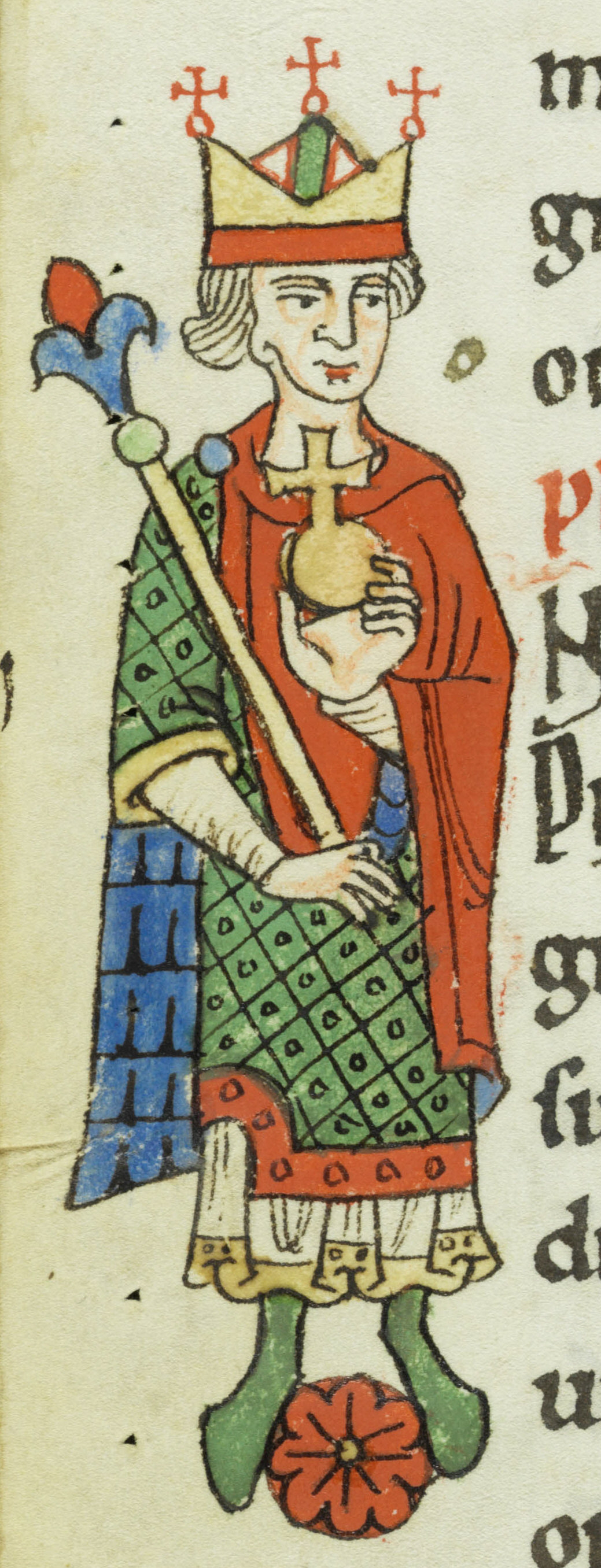 Acta Sancti Petri in Augia; St. Gallen, Kantonsbibliothek, Vadianische Sammlung, VadSlg Ms. 321, S. 40, Herzog Philipp von Schwaben